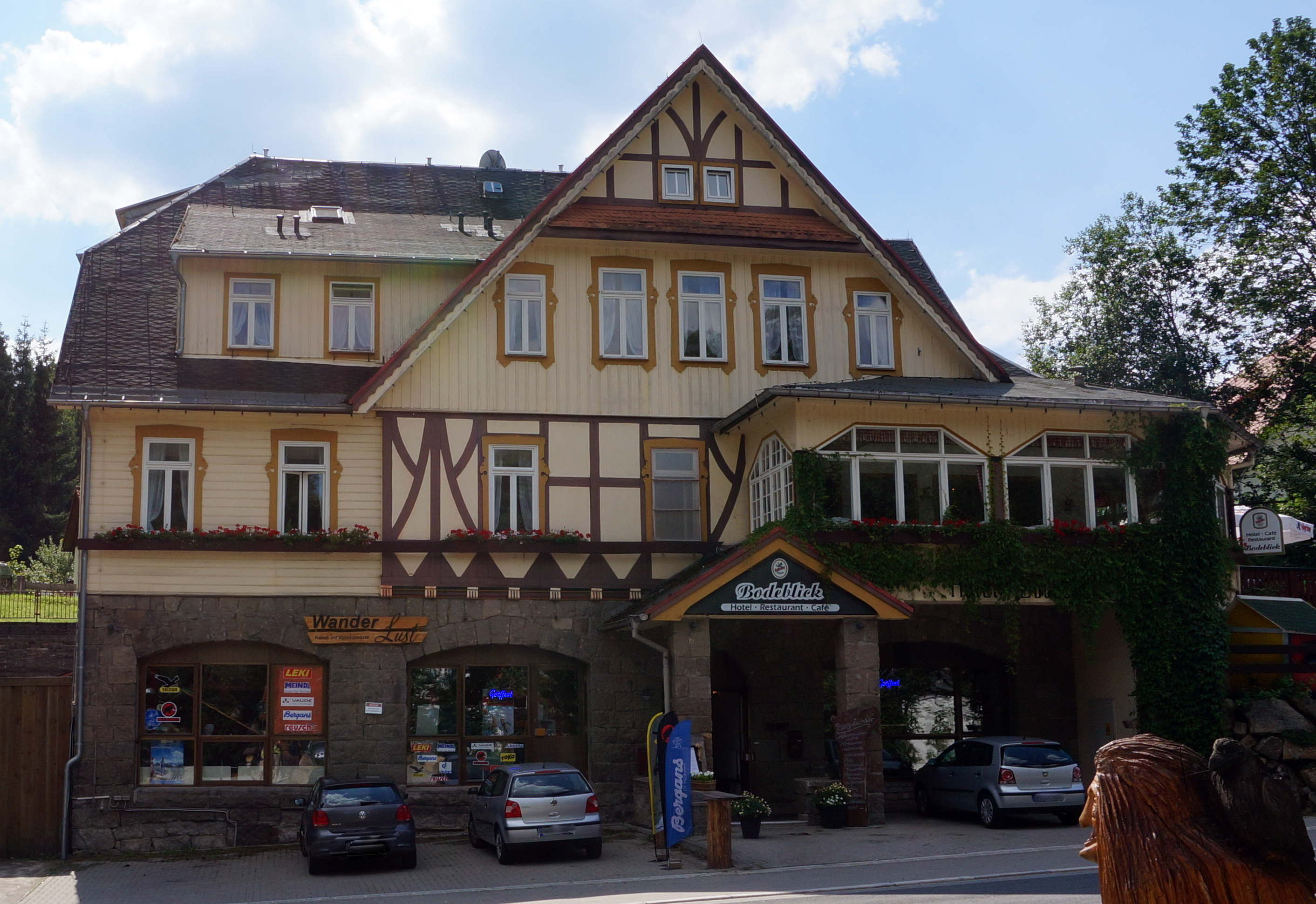 Das Hotel liegt an der Kalten Bode. Adresseː Barenberg 1, 38879 Wernigerode, Ortsteil Schierke